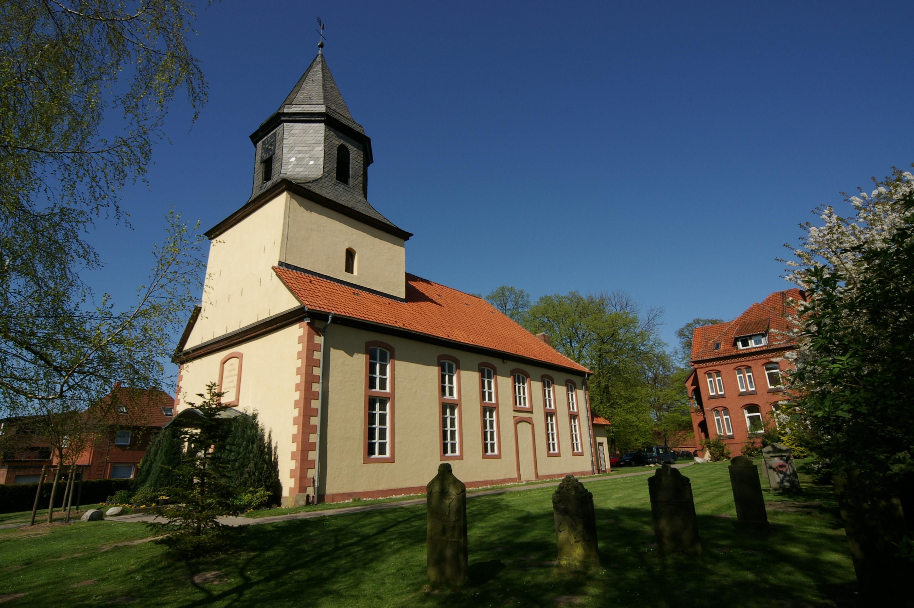 Garbsen, OT Osterwald, Kirche. 2005-04-20